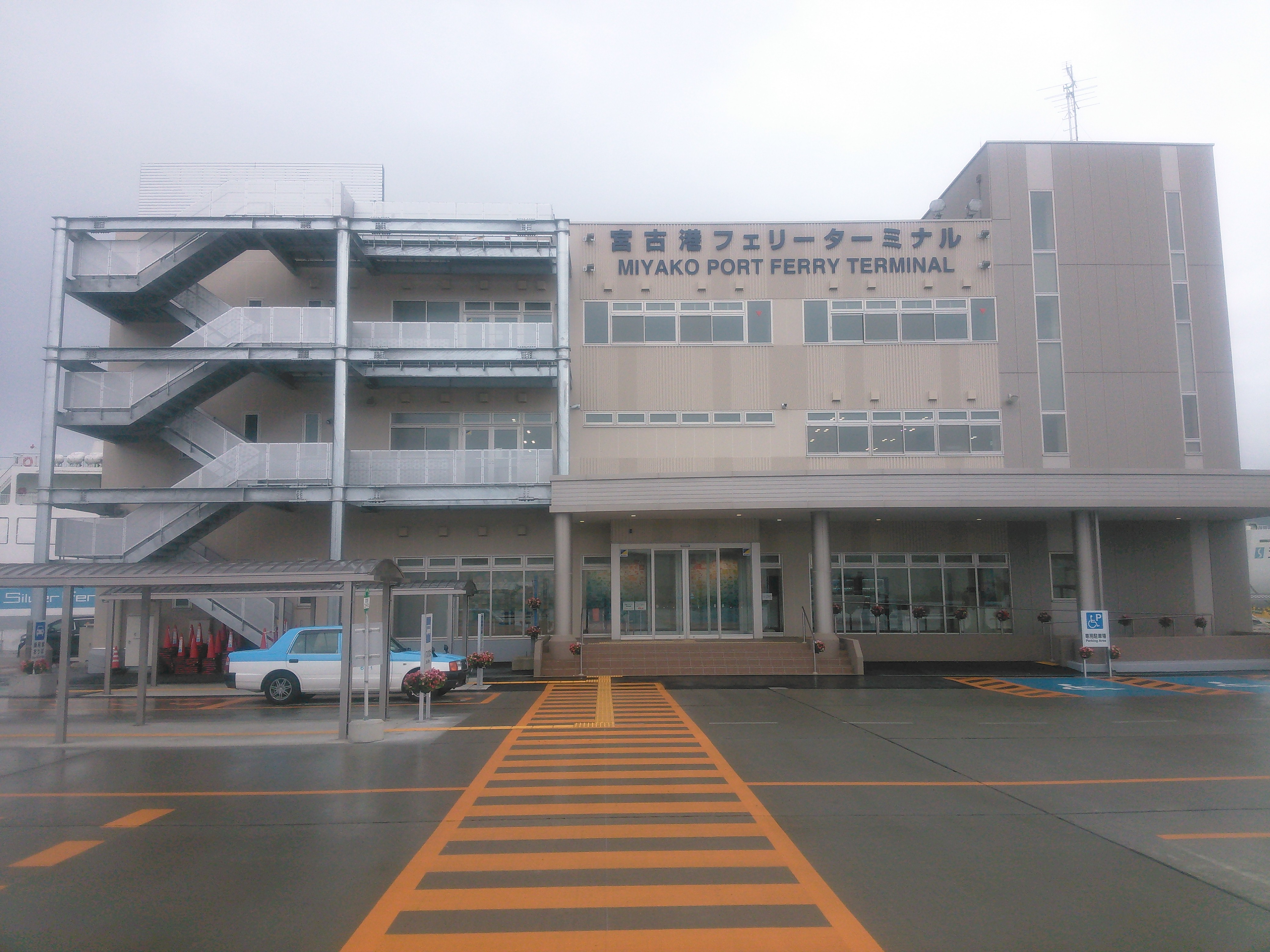 岩手県宮古市、宮古港藤原埠頭。室蘭港とを結ぶ川崎近海汽船のフェリーターミナル。